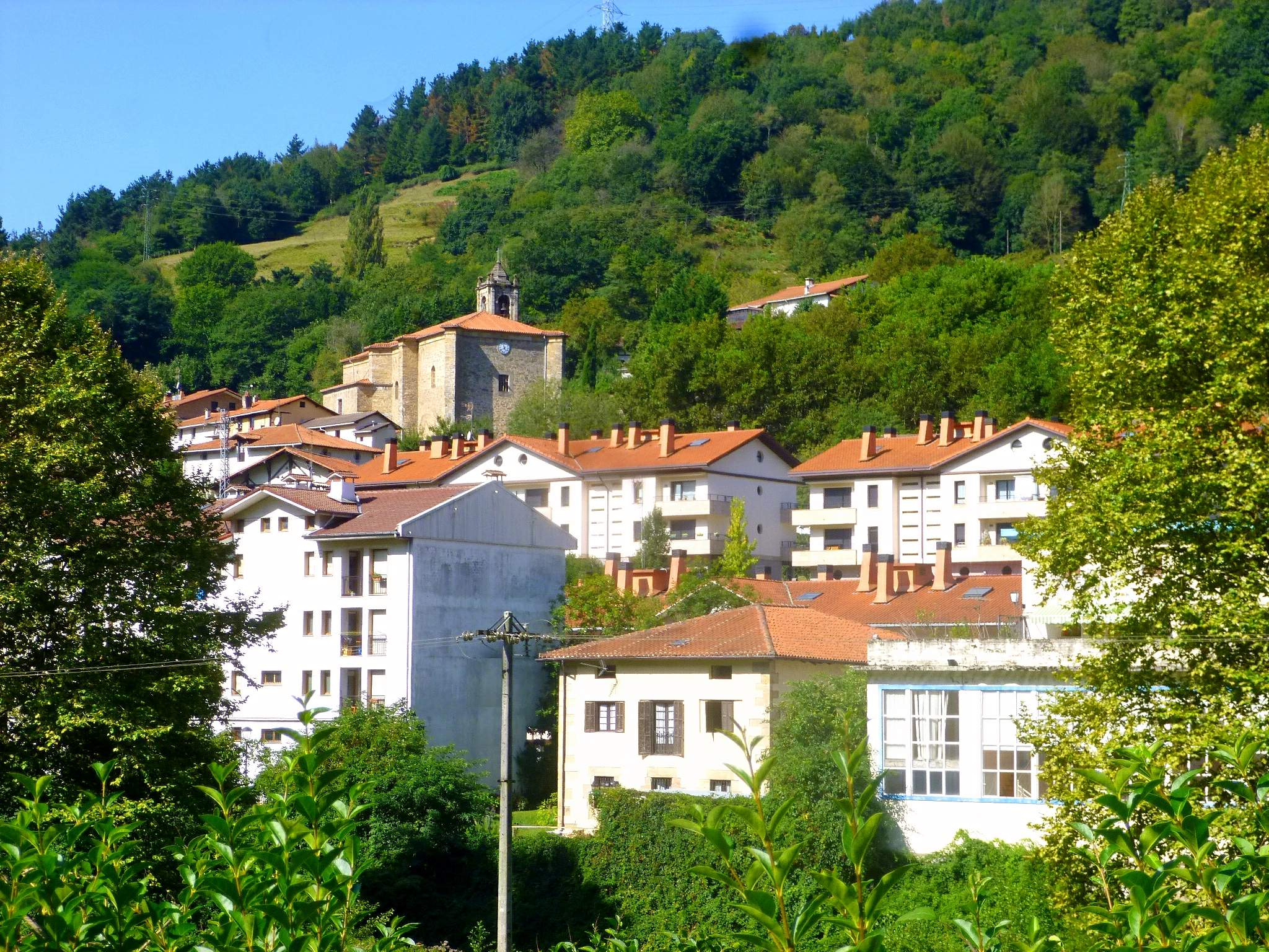 Itsasondo (Guipúzcoa)